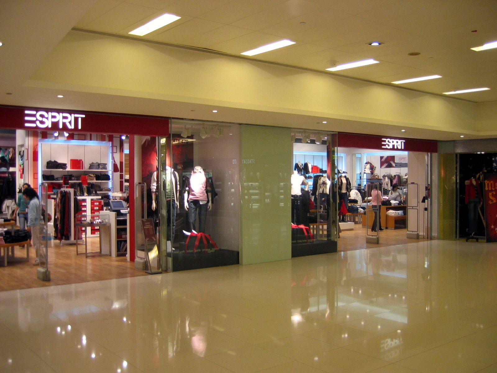 Esprit Store in Hong Kong